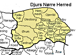 Nørredjurs Herred - Gl. Randers Amt. Map by Svend-Erik Christiansen.